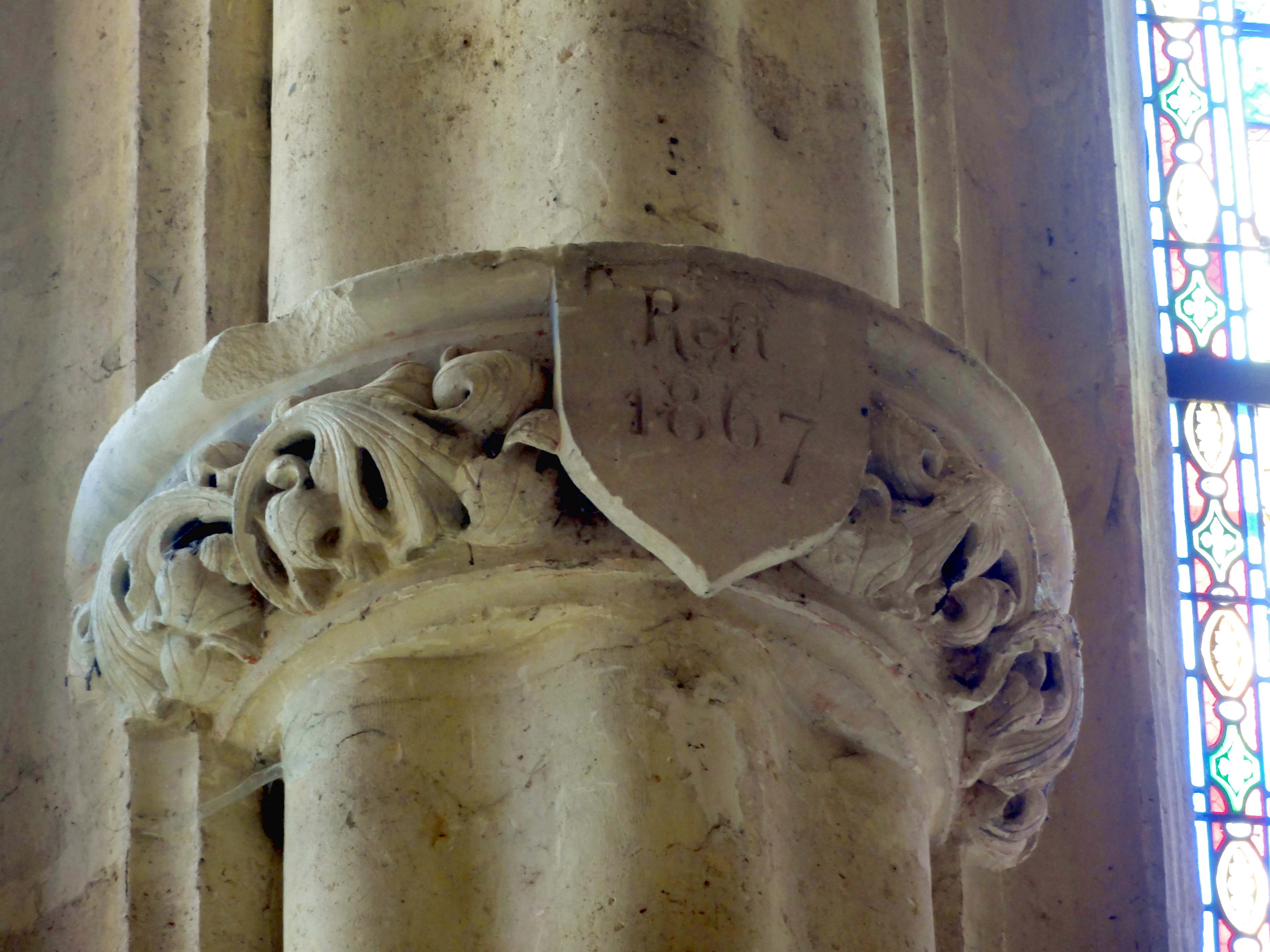 Abside, chapiteau à droite de la baie d'axe.